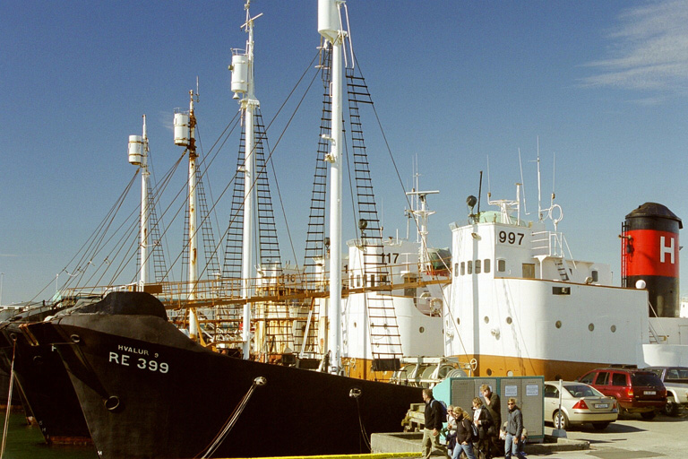 Hvalfangerskibe lagt op i Reykjavik 2006